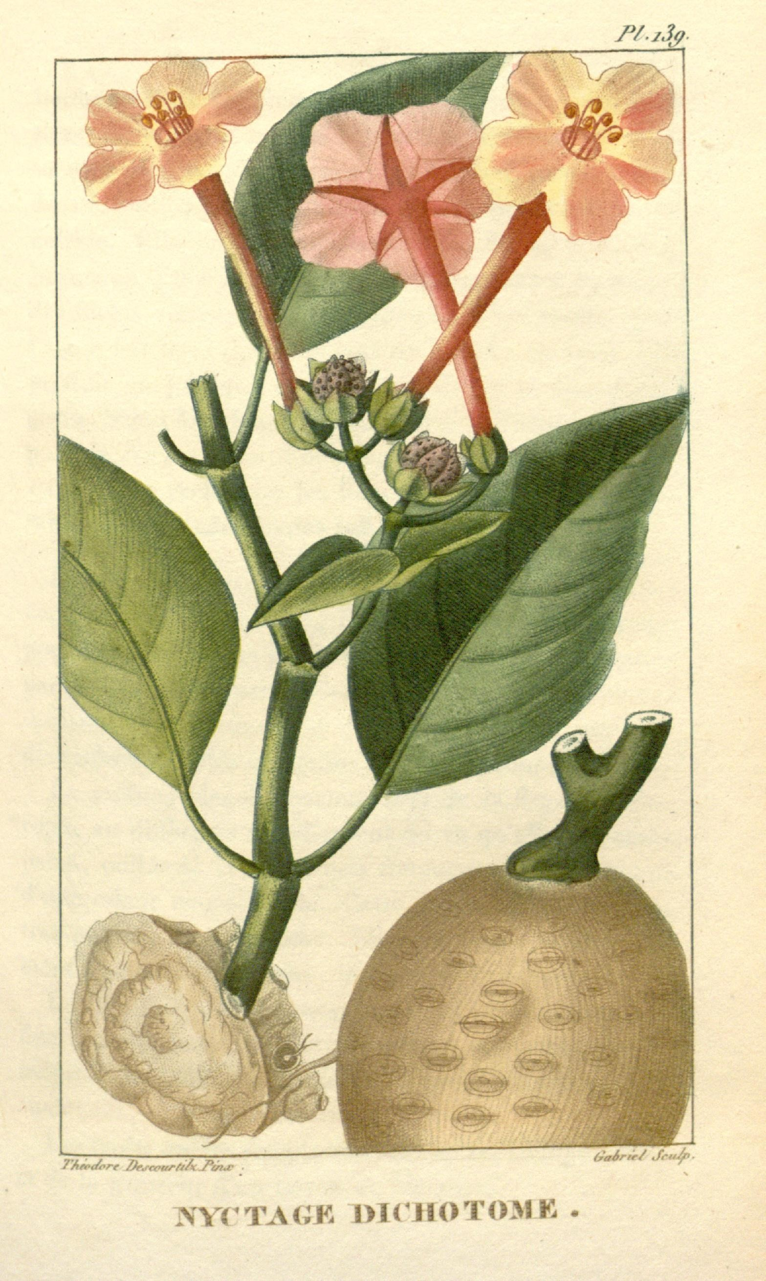 ri. j3ç i'Ae0./^rt ùe^'omrf^^ "V/*^ / JVm4^ KYÏ TAG^E l.I("lTOTOME